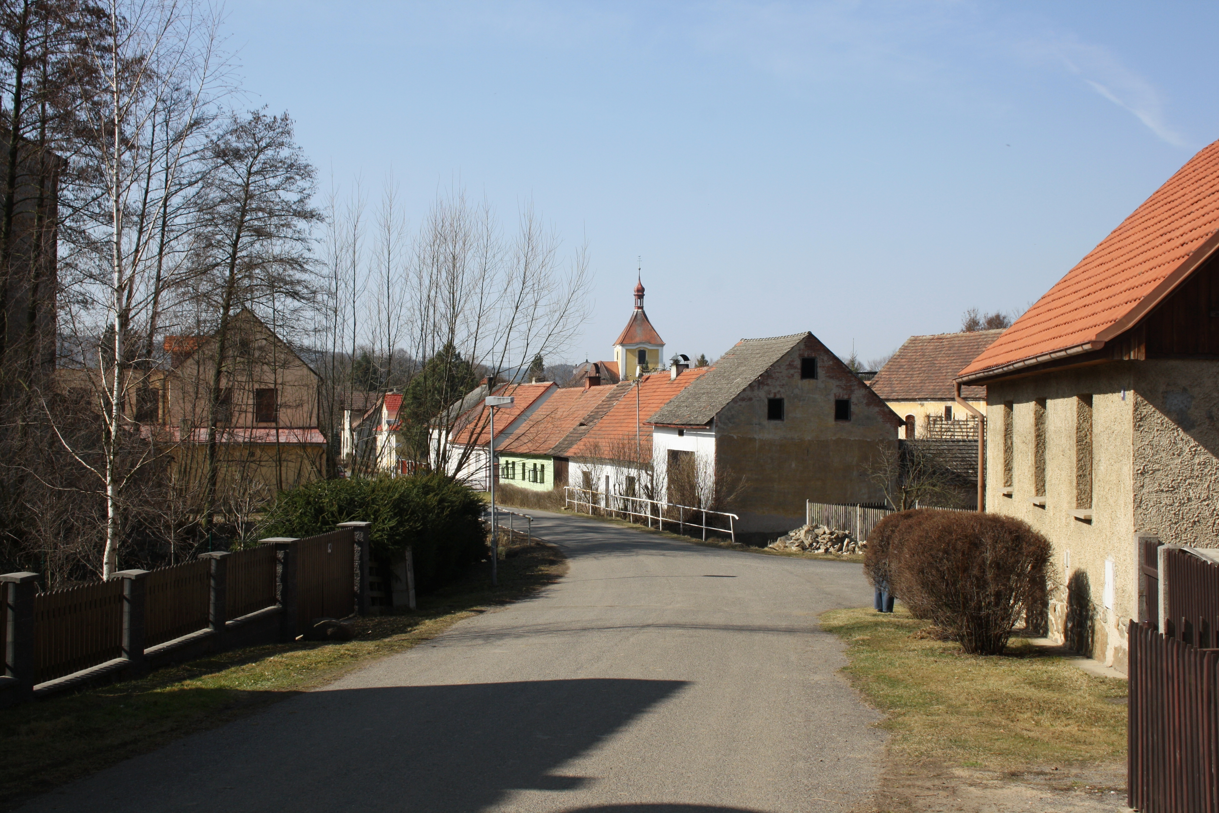 Stebno